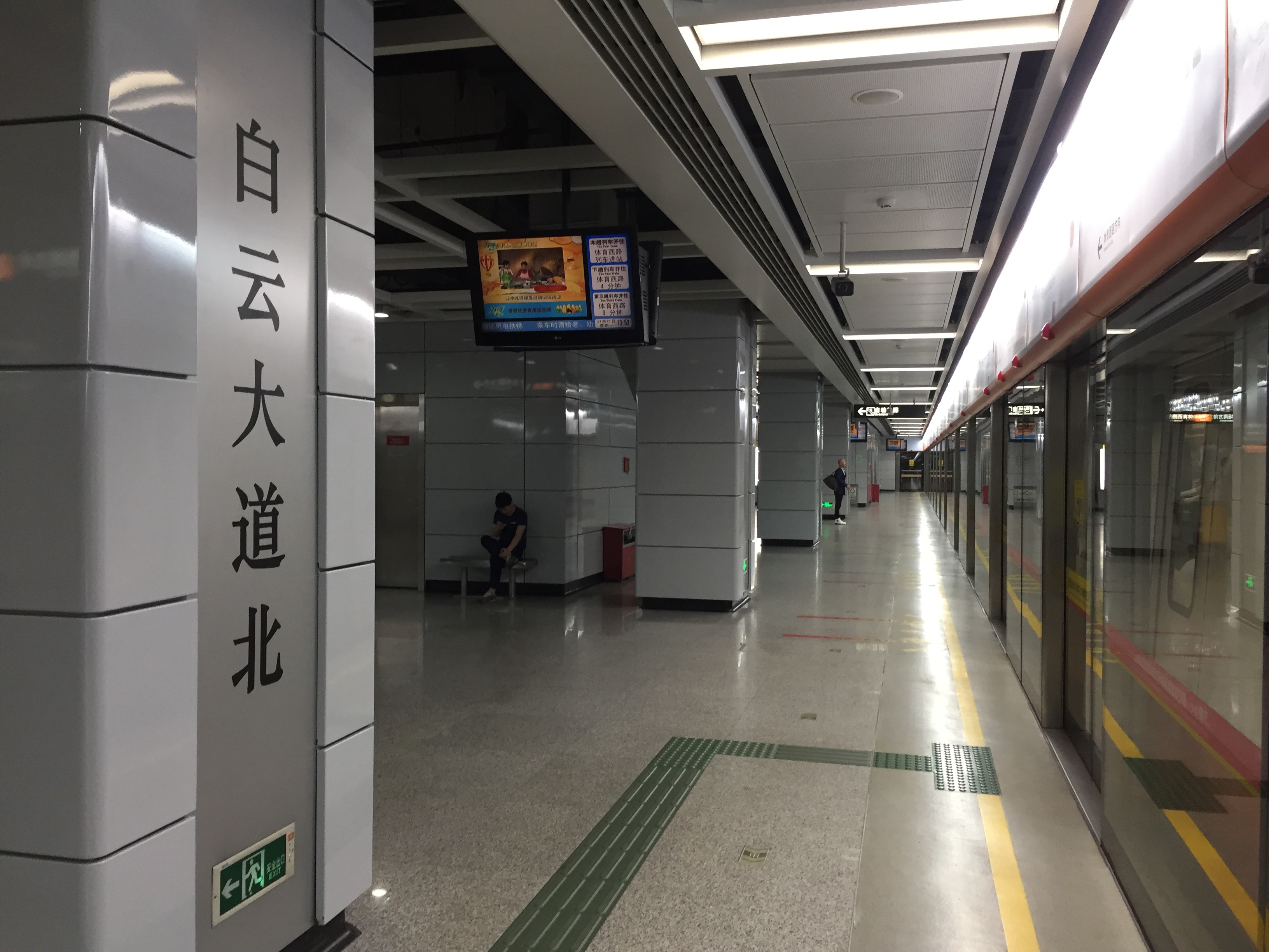 广州地铁白云大道北站